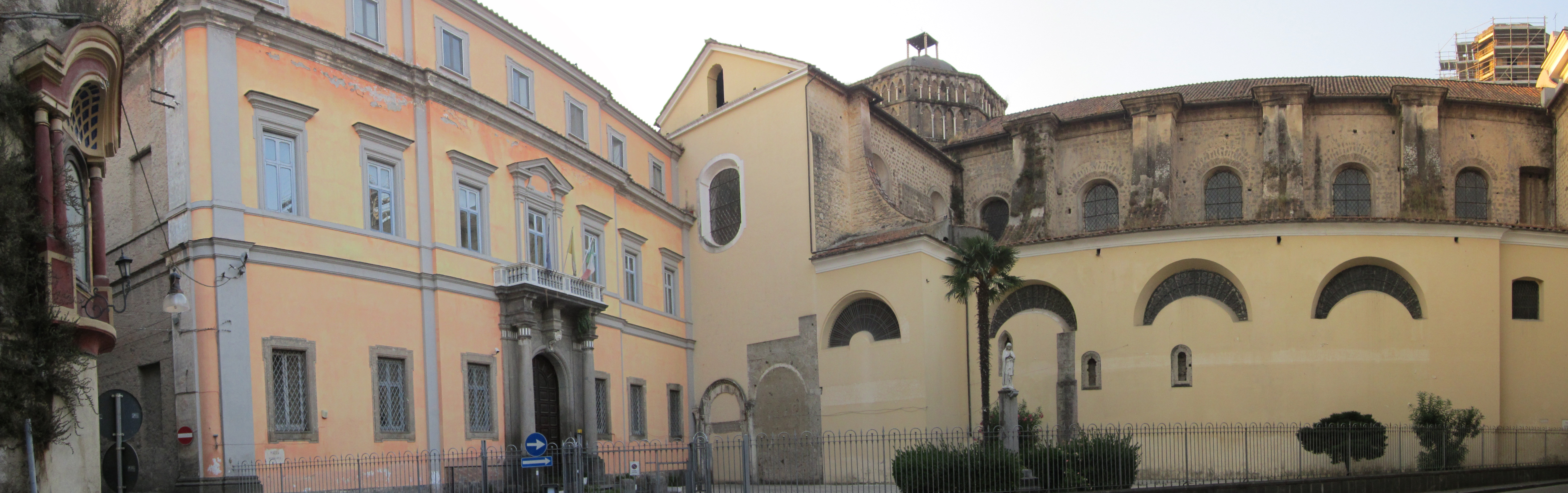 Opera propria